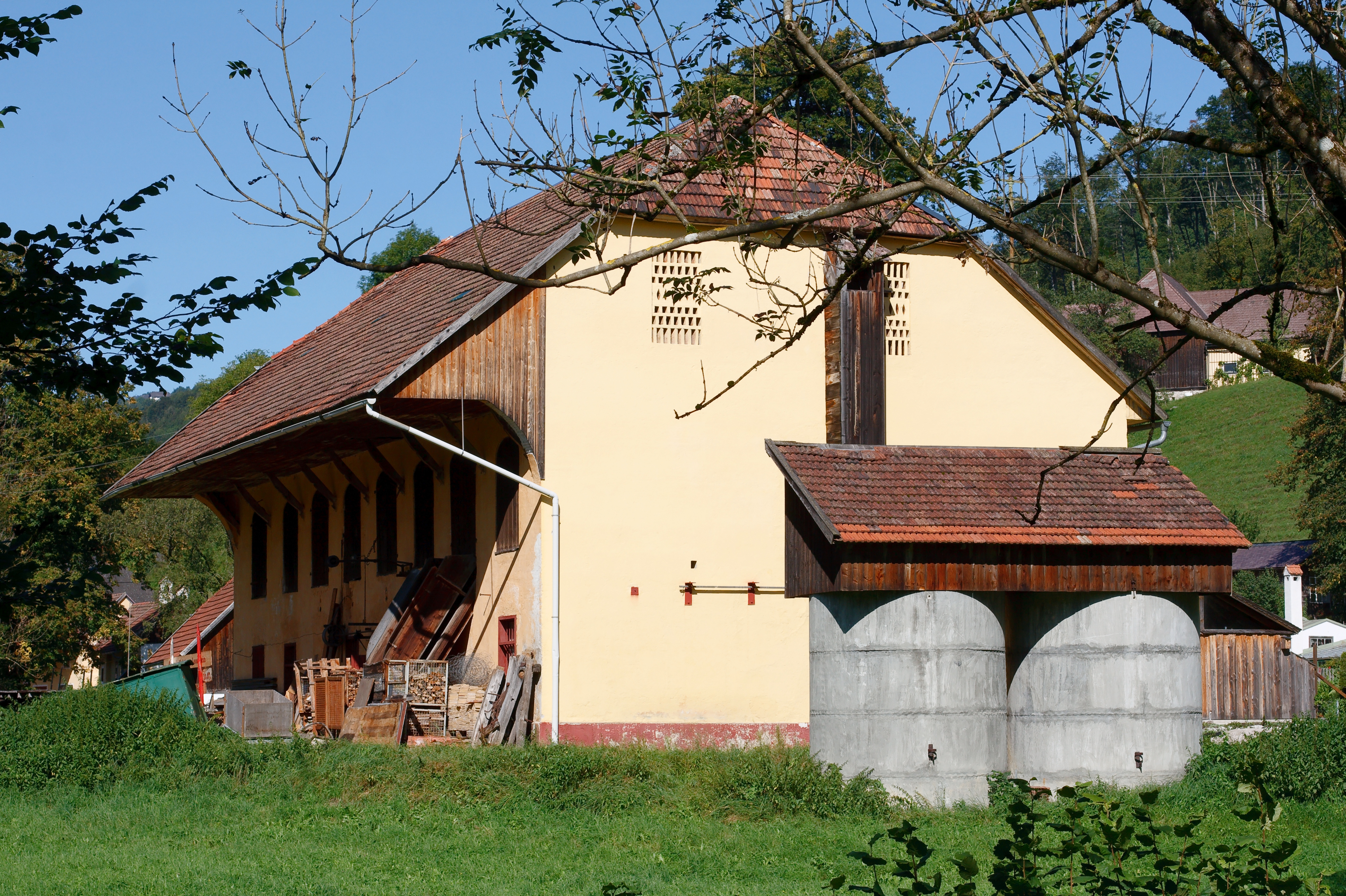 Stallgebäude (Kuhstall) im Freilichtmuseum Schmiedleithen